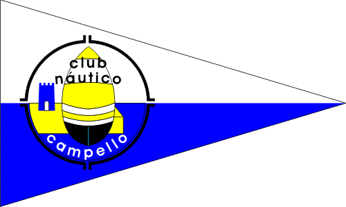 Bandera del Club Nautico de El Campello